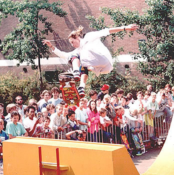 Ollie, Tony Hawk op de miniramp, Wassenaar 1987 Foto door Hans Lucas